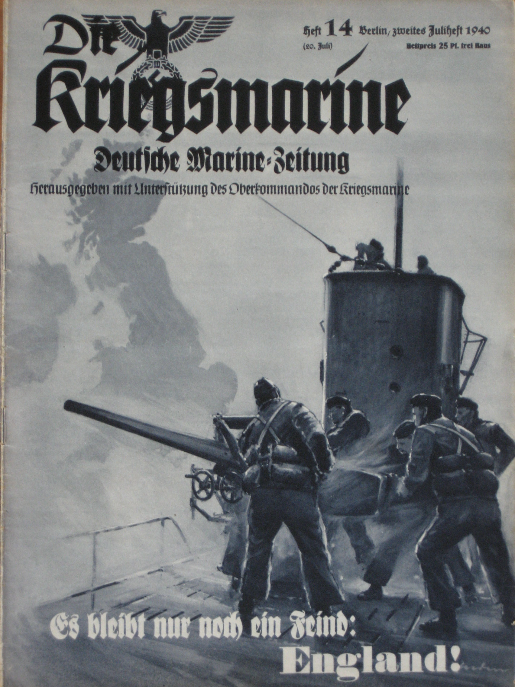 Titelblatt des Heftes 14-1940 der deutschen Propagandazeitschrift "Kriegsmarine - Deutsche Marine-Zeitung"